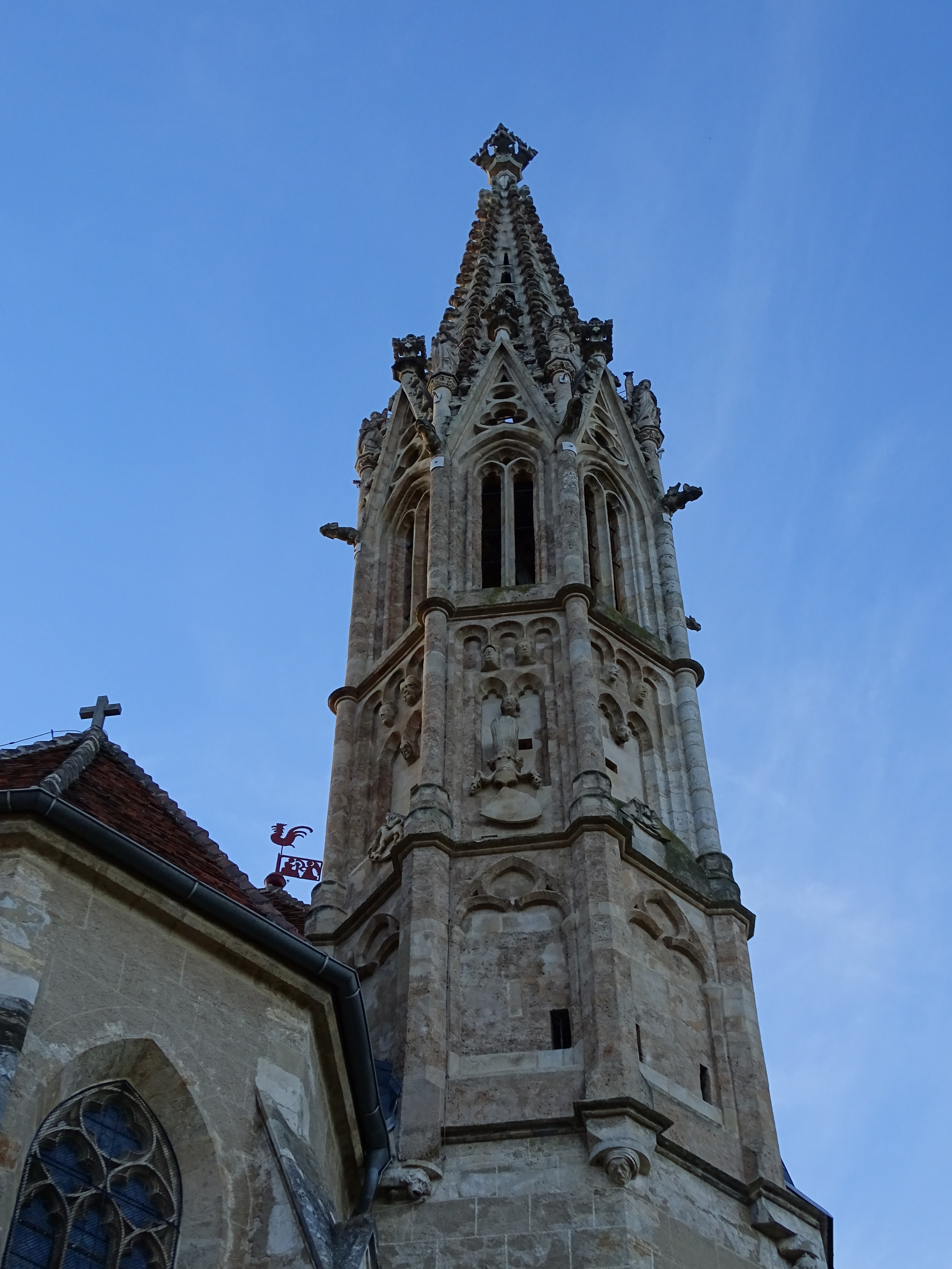 Der Turm der Wallfahrtskirche Maria Straßengel